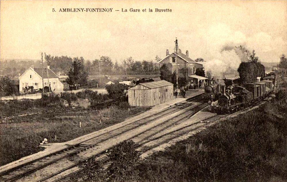 Train de marchandises (à droite) se faisant dépasser par un train de voyageurs.